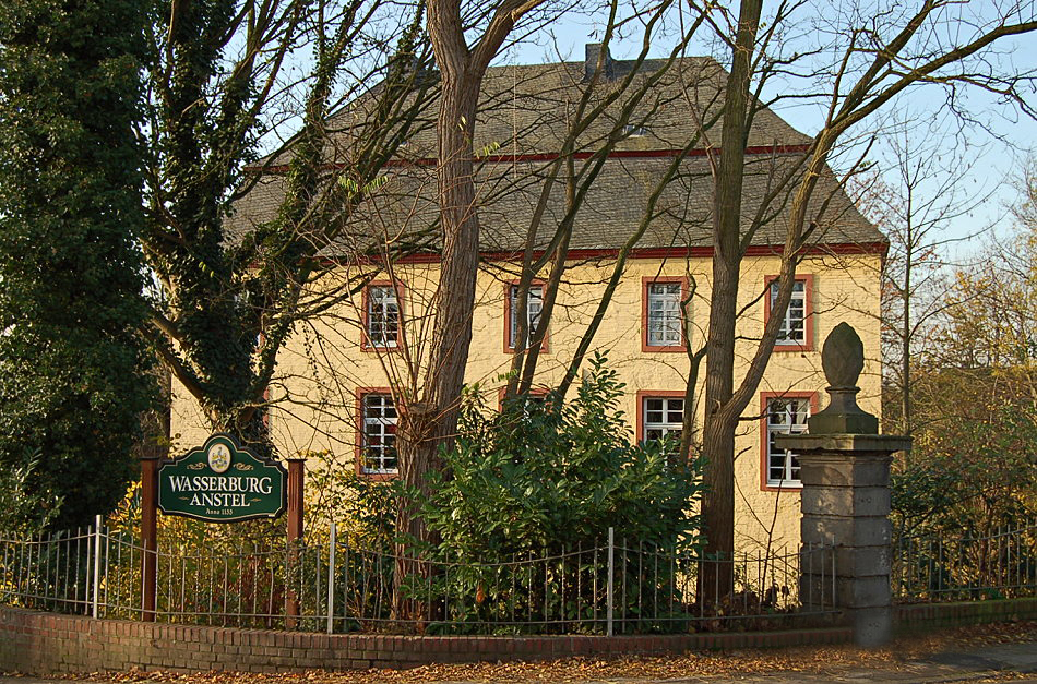 Wasserburg Anstel in Rommerskirchen-Anstel / Deutschland.